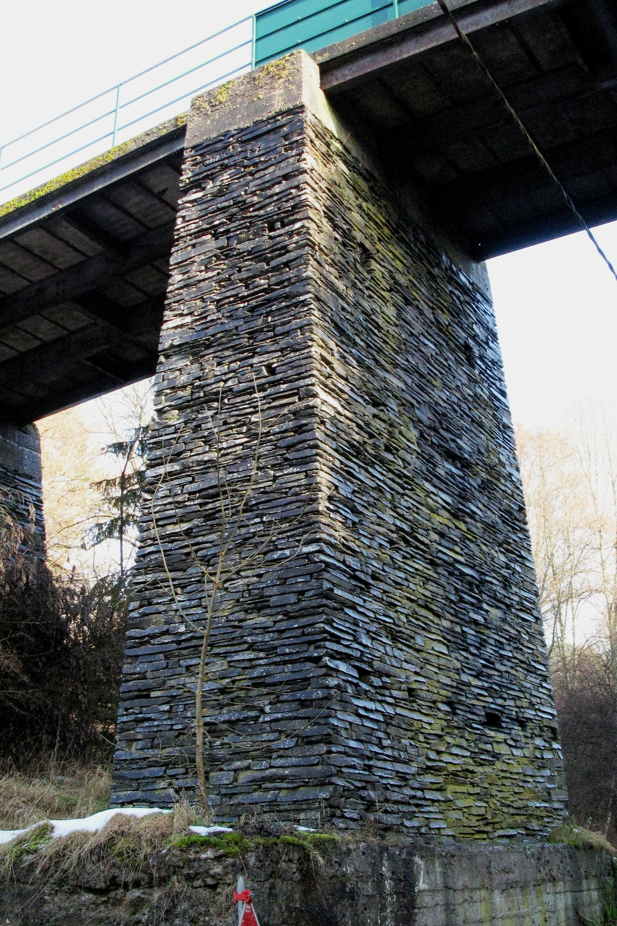 E Bréckepilier aus Leeën zu Uewermarteleng, vun der Janglisstreck.